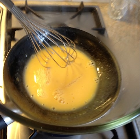 Abziehen zur Rose der Mischung aus Reduktion von Essig und Gewürzen mit Eigelb und Butter bei der Zubereitung von Sauce béarnaise. Das Aufschlagen der Mischung zu einer dicklichen Sauce erfolgt hier in einer flachen Schüssel im warmen Wasserbad.